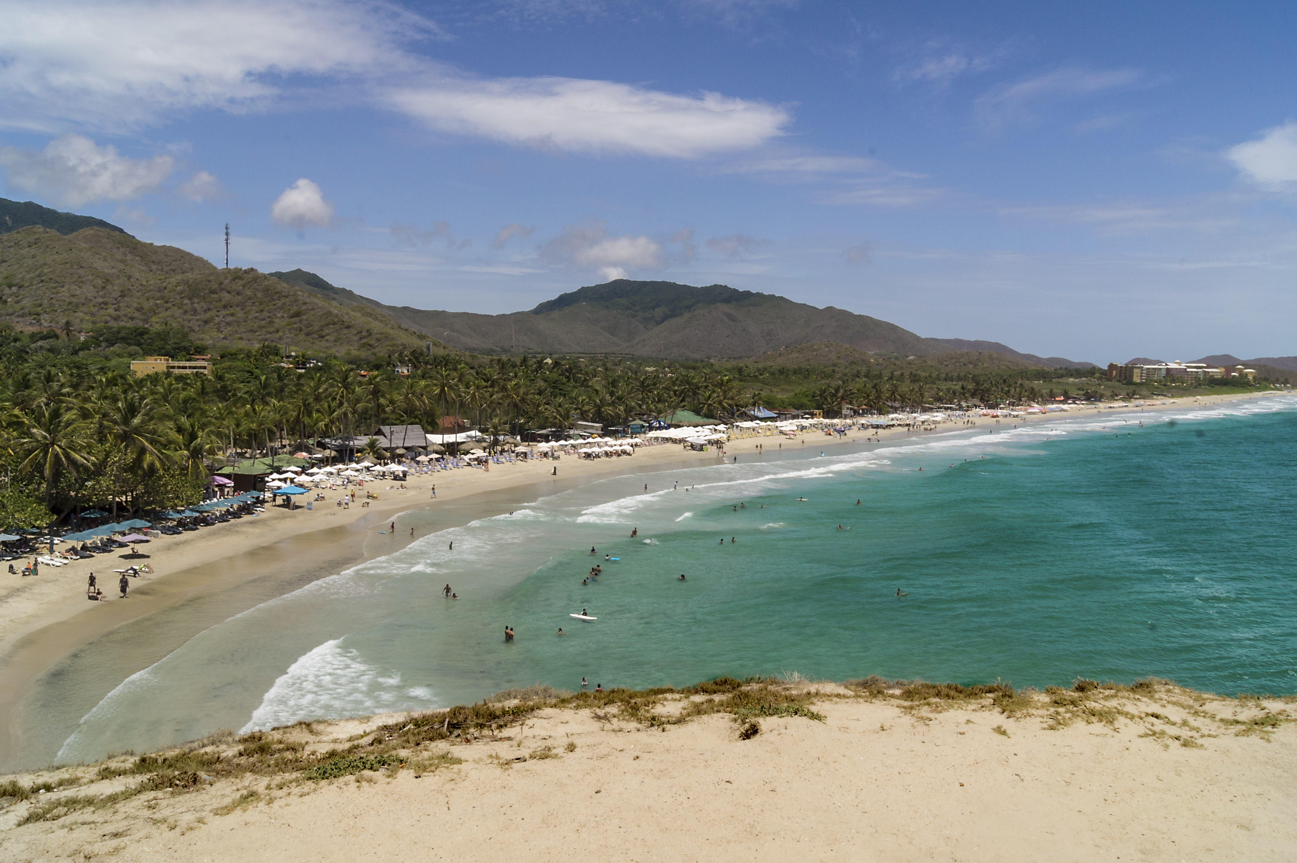 Balneario Playa Parguito, ubicada en la isla de Margarita.